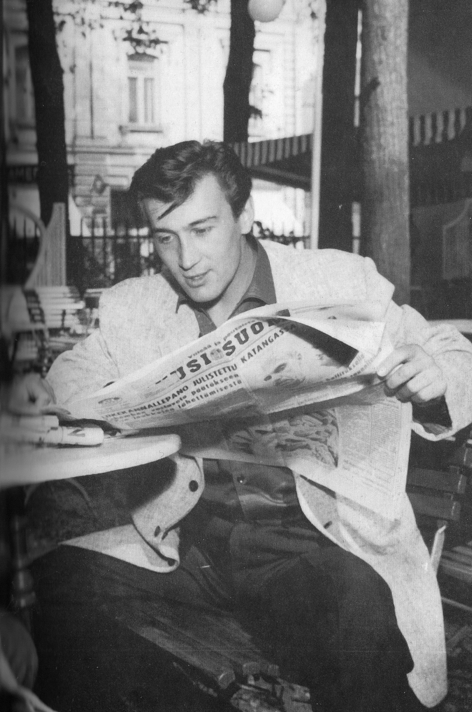 Suomalainen näyttelijä ja ohjaaja Ville-Veikko Salminen (1937-2006) vuonna 1960 Turun Hamburger Börsin terassilla.